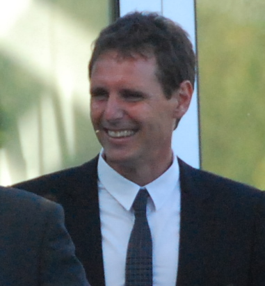 Flemming Povlsen, tidligere dansk fodboldspiller.